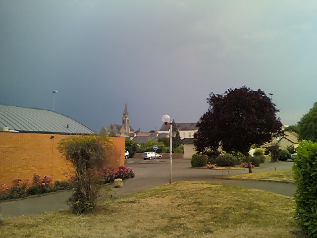 L'église Saint-Germain vue depuis la salle Georges Brassens.